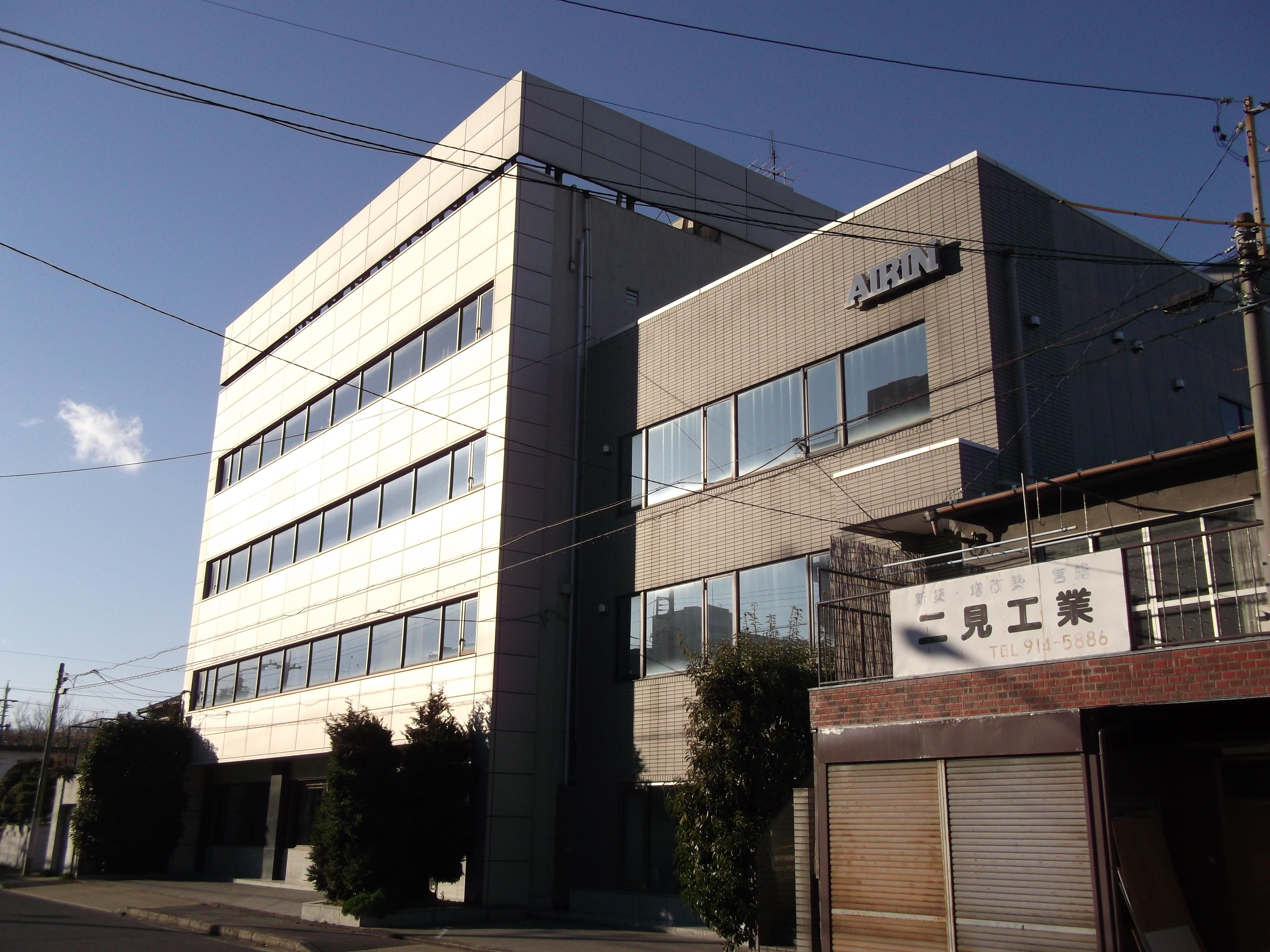 名古屋市北区水草町1丁目にあるアイリン本社を南東側から写す